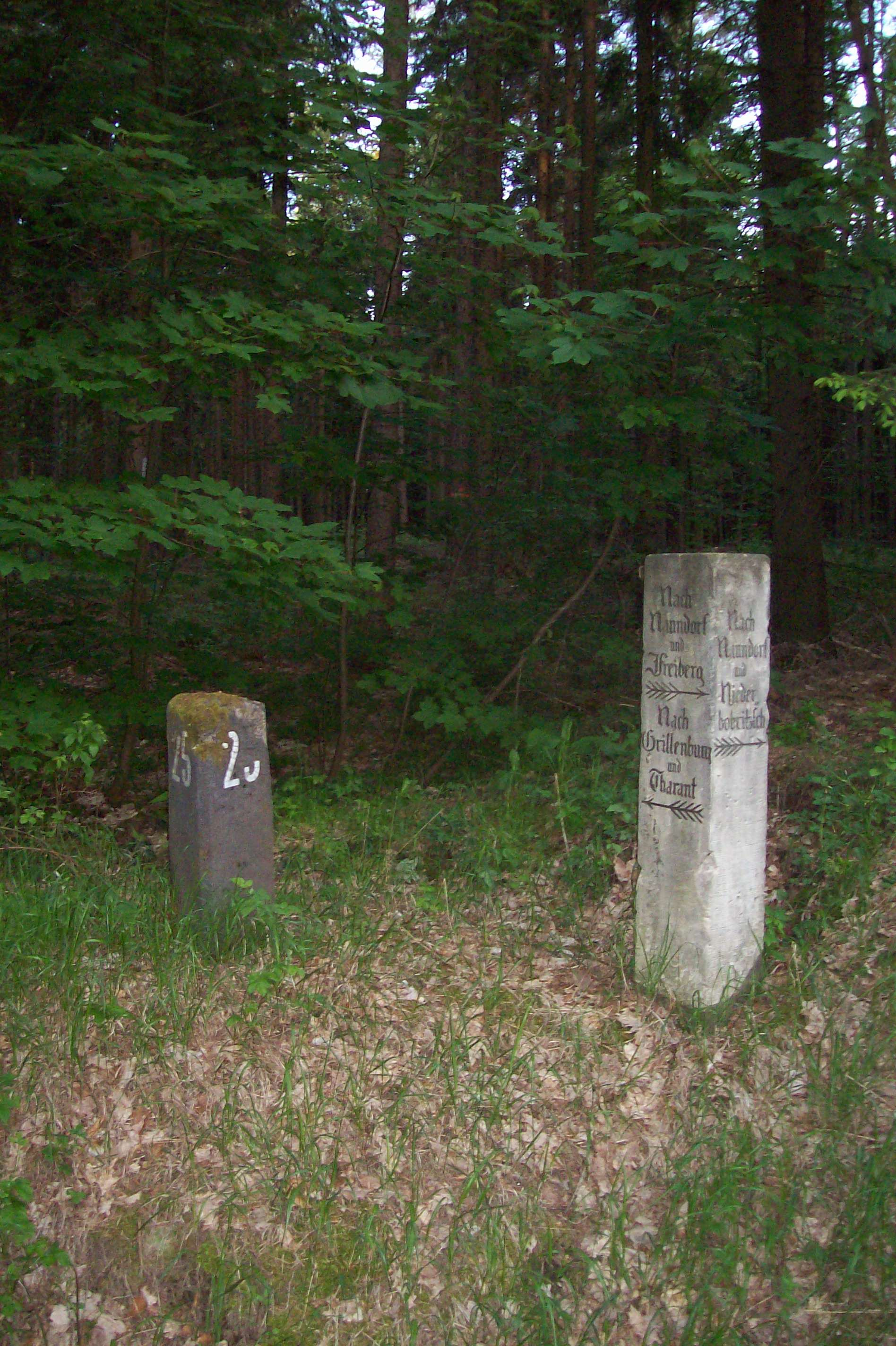 Kilometerstein vom 1. Sachsenring neben Wegsäule im Tharandter Wald